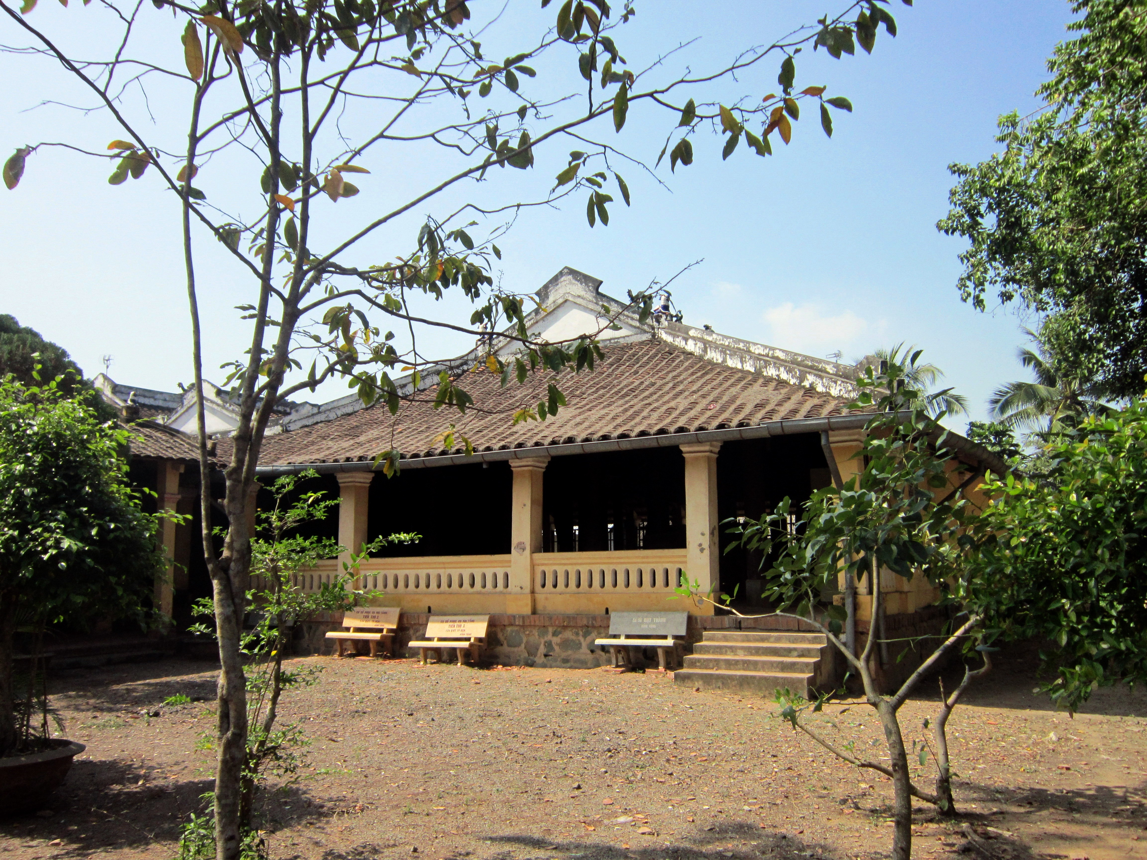 Đình Tân Thạch là một ngôi đình cổ; hiện tọa lạc tại ấp 9, xã Tân Thạch, huyện Châu Thành, tỉnh Bến Tre, Việt Nam.